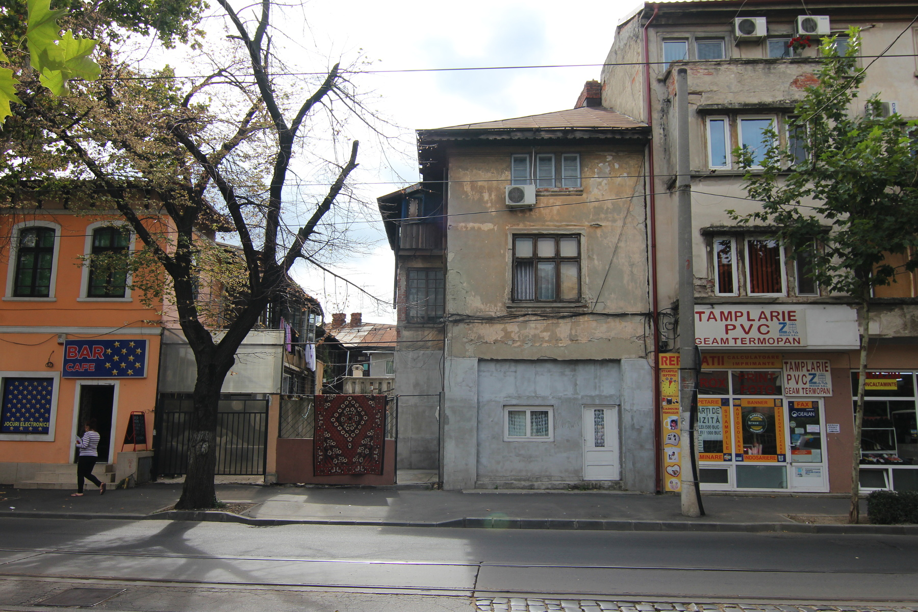 Casă pe Dudești